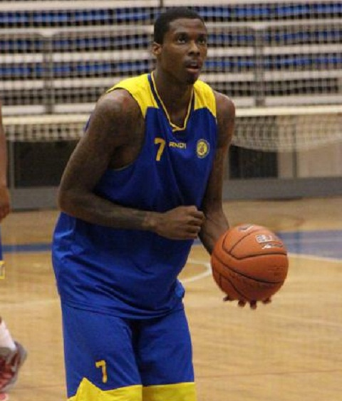 קני גבריאל במדי מכבי אשדוד Kenny gabriel in maccabi ashdod